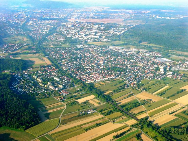 Luftbild von Gundelfingen aufgenommen bei einer Ballonfahrt